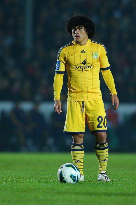 Александрия 1:4 Металлист